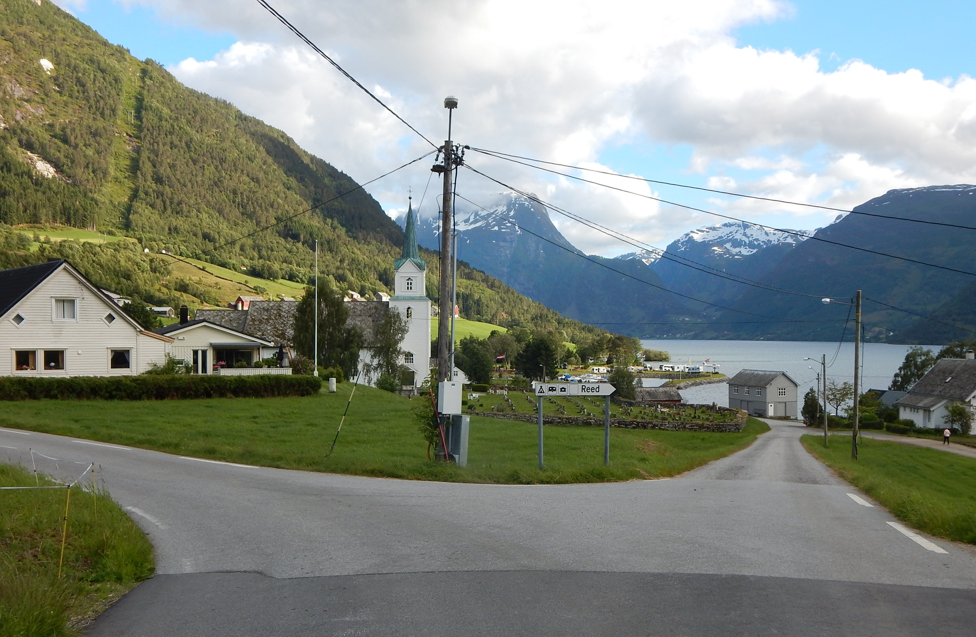 Fylkesvei 5734 (tidl. 694) tar av til venstre i bildet. I bakgrunnen ses Breim kirke og Reed camping.